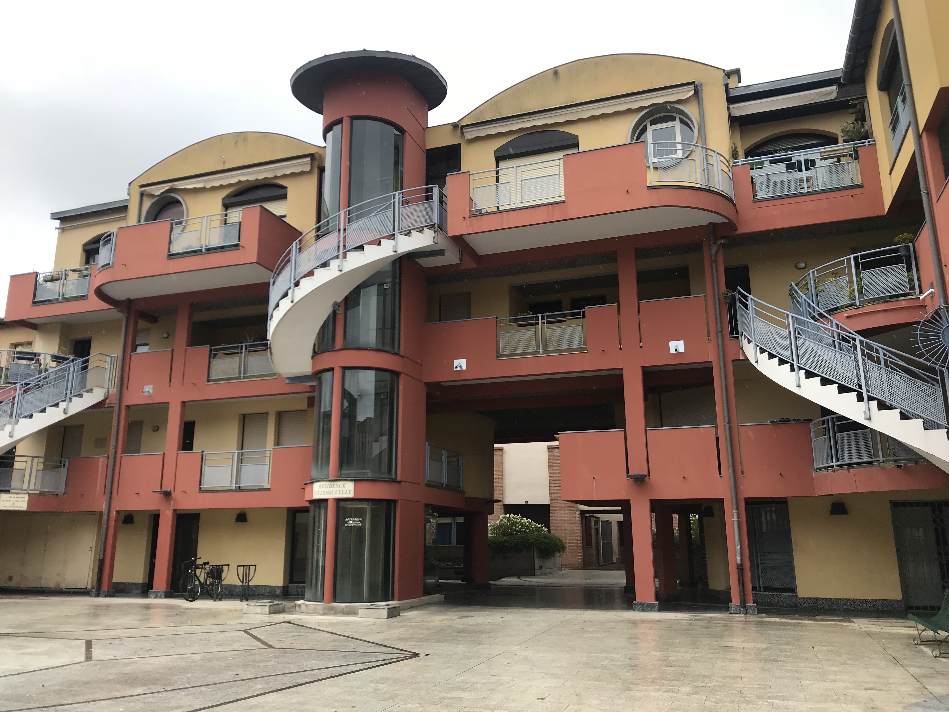 La résidence "Villenouvelle" de Montauban